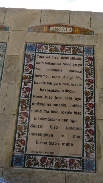 Church of the Pater Noster, Mount of Olives, Jerusalem כנסיית אבינו שבשמים Sanctuary of the Eleona